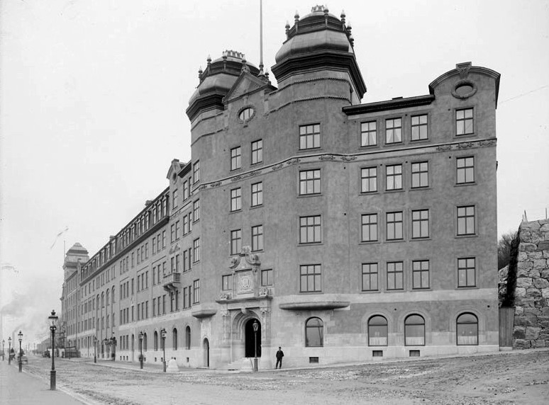 Byggnaden för "Stockholms gasverk" vid Torsgatan i Stockholm år 1914, ritat av Ferdinand Boberg